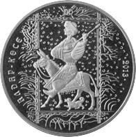 Монета Казахстана Алдар-Косе